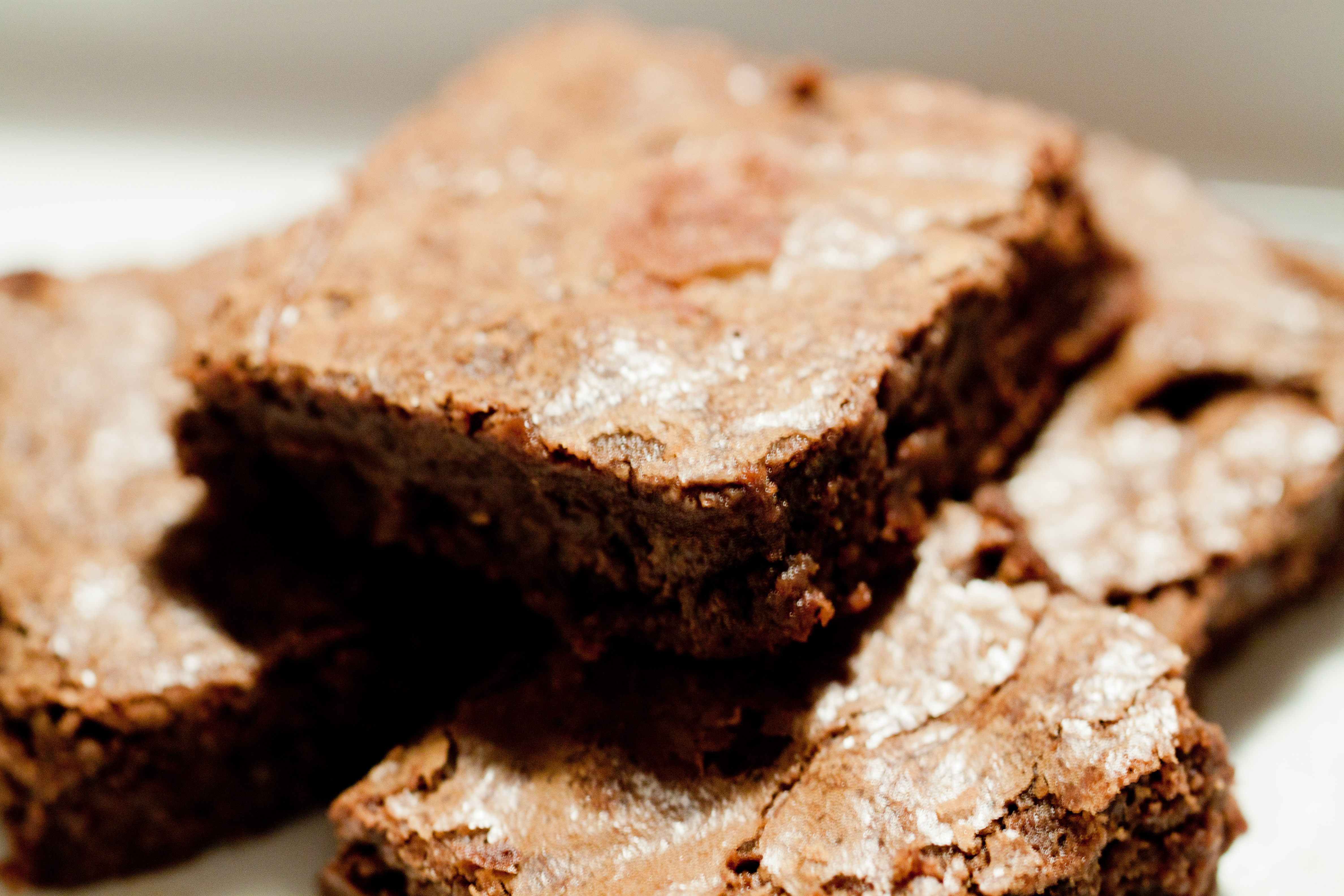 En klassisk brownie, skuren i rutor. Både smak och konsistens kan jämföras med kladdkakan.